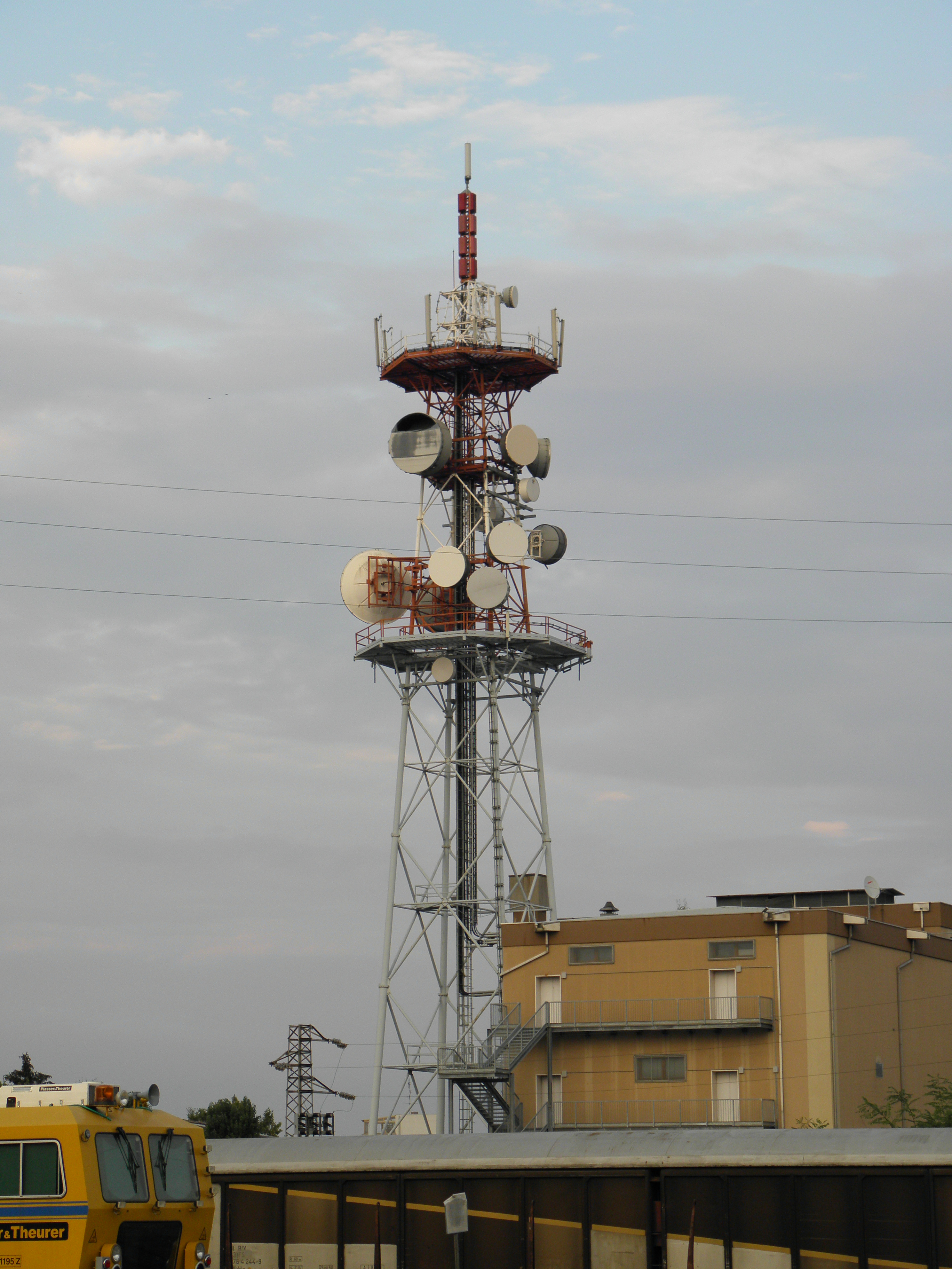 Traliccio con le antenne della sede Telecom di Rovigo.